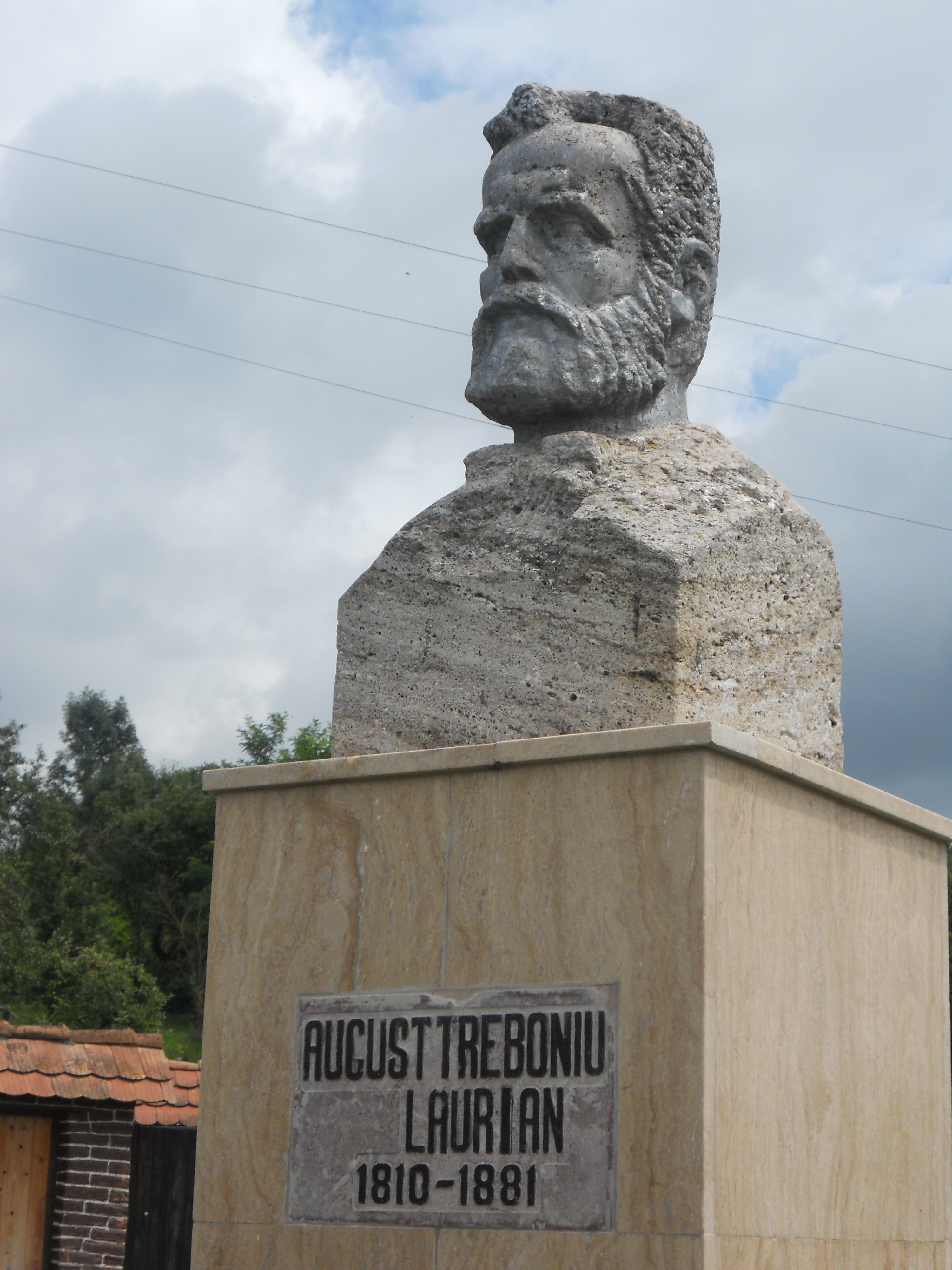 Fofeldea